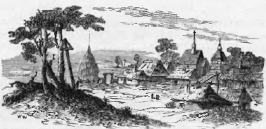 Беларуская (тарашкевіца): Нямецкае паселішча ў ваколіцах Кобрына.